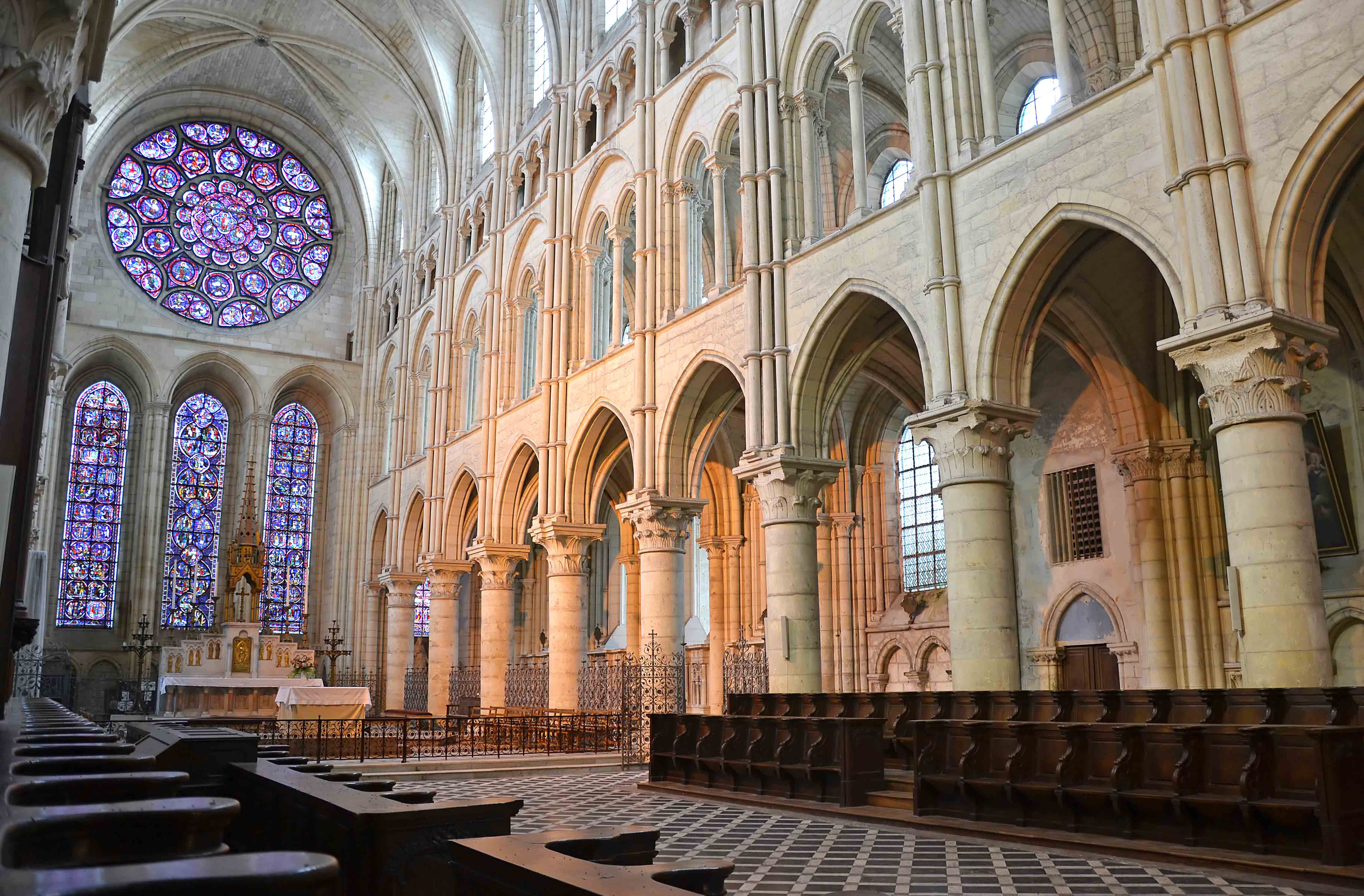 Cathédrale Notre-Dame- The nave